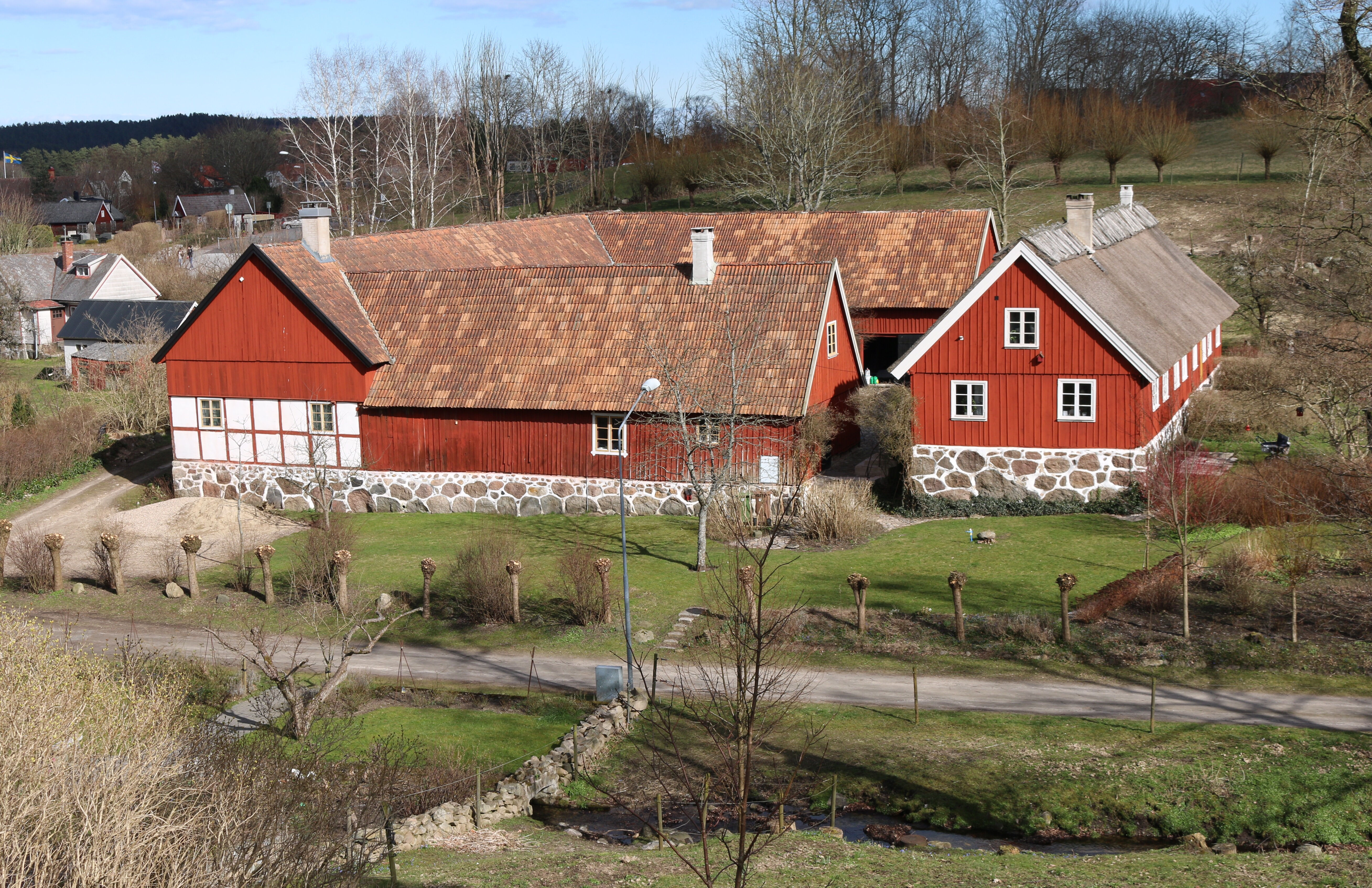 Gammal gård i Brösarp